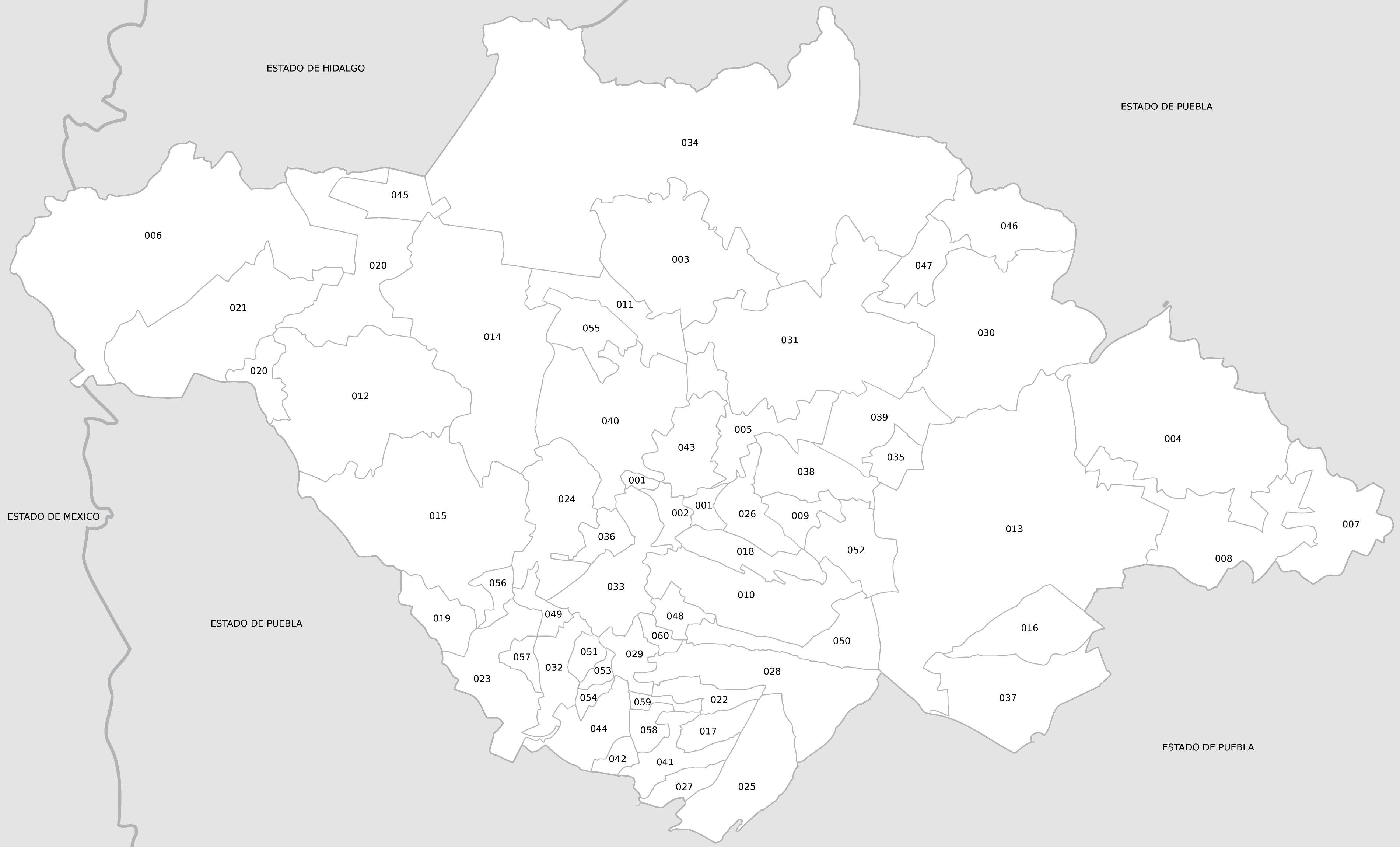 Municipios de Tlaxcala con clave municipal